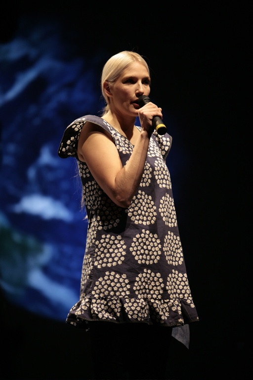 Tuuli Kaskinen